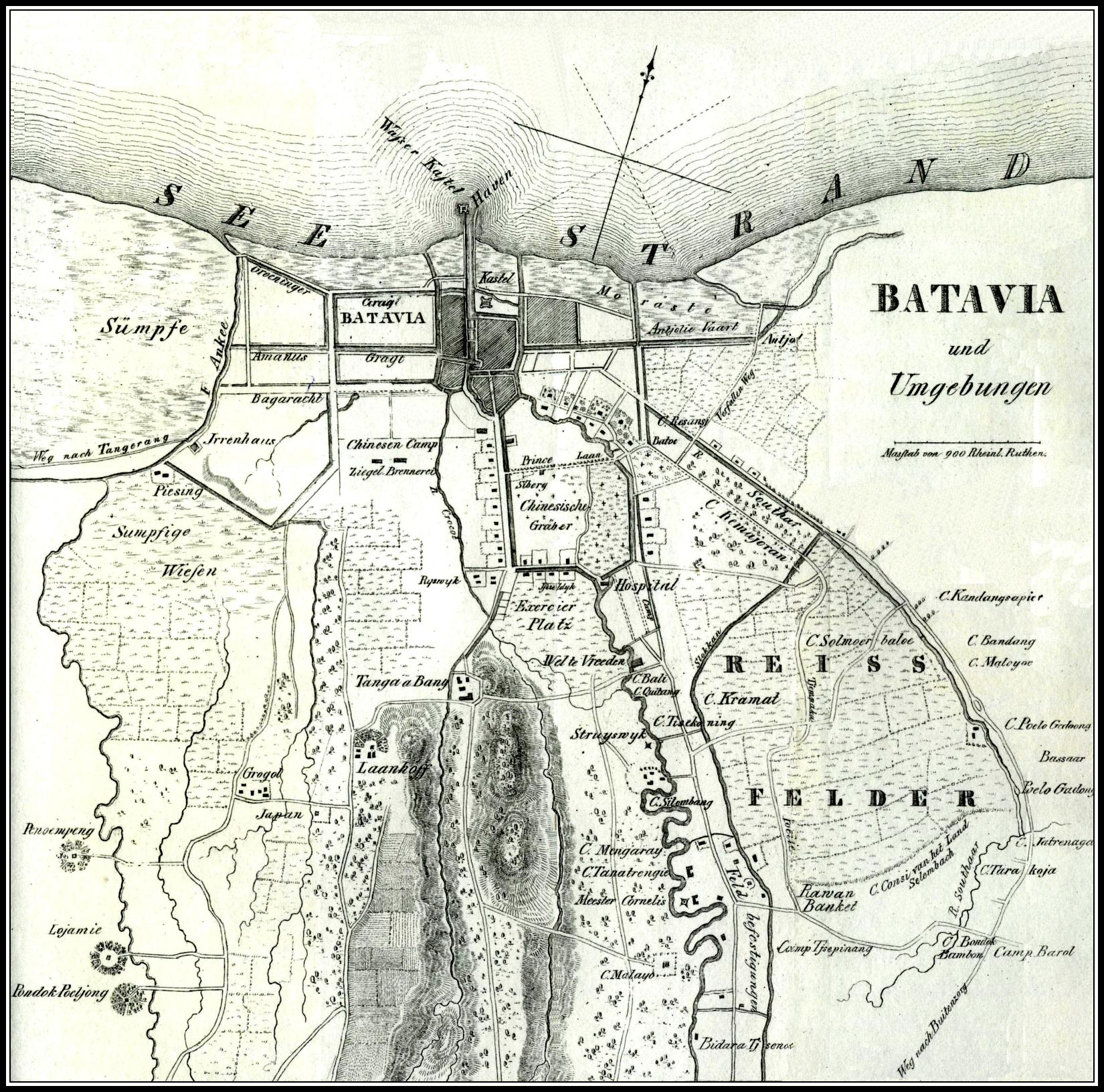 Batavia